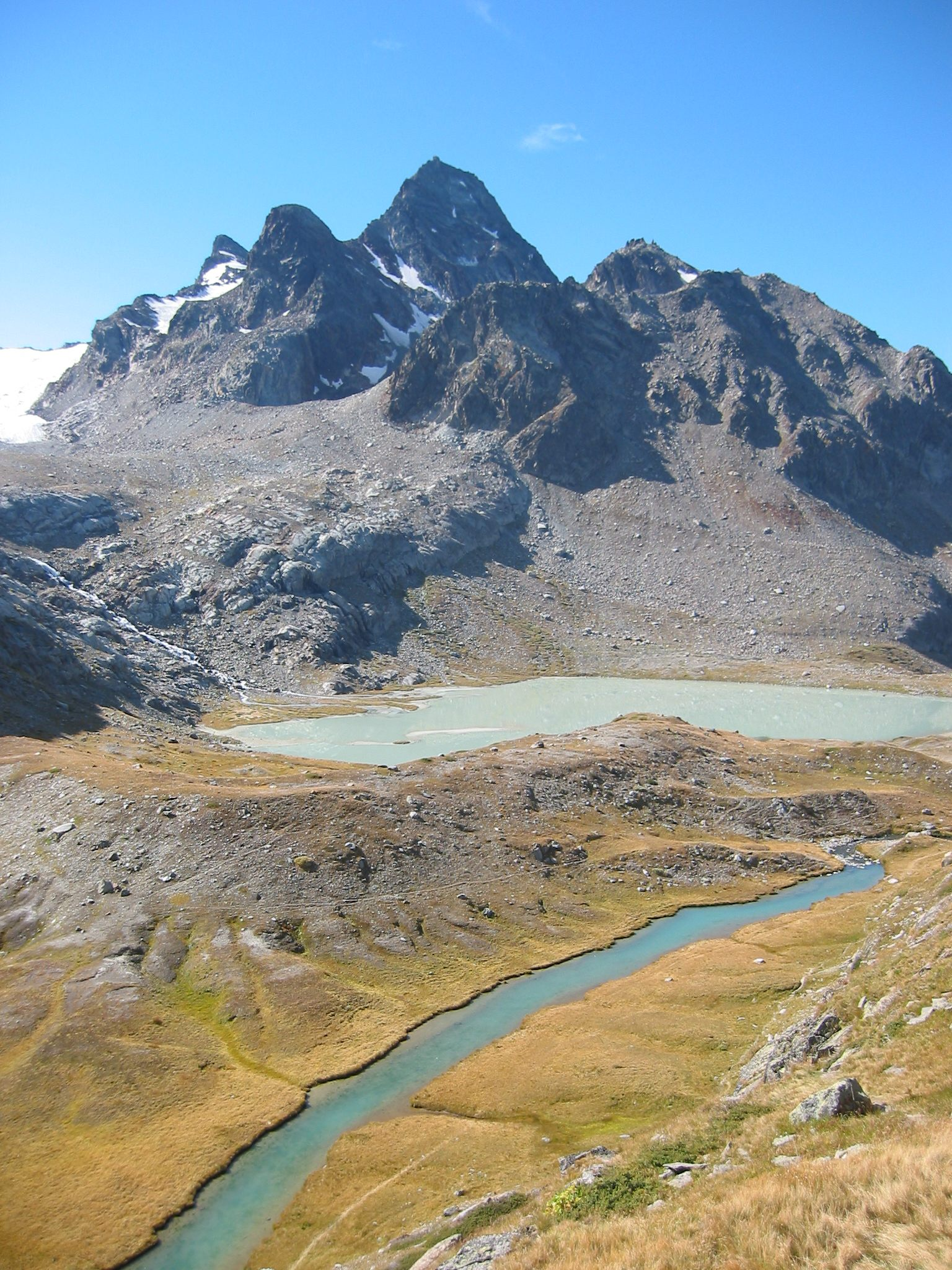 La Thuile (AO Italy) - Il Grand Assaly, nei pressi del rifugio Alberto Deffeyes